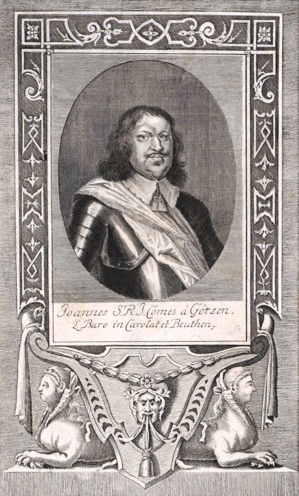 Johannes Götzen (1599–1645)